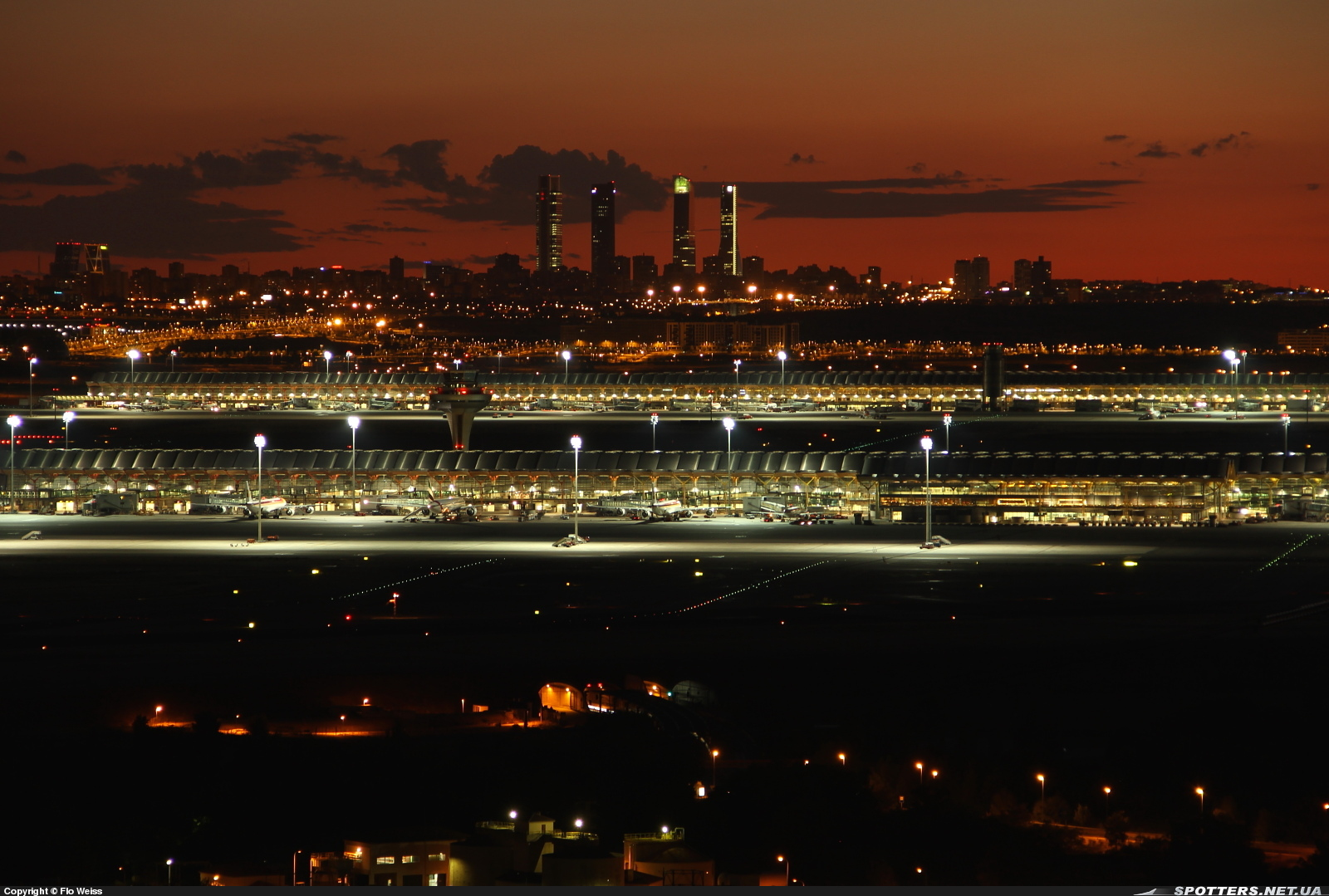 Terminal 4 at night